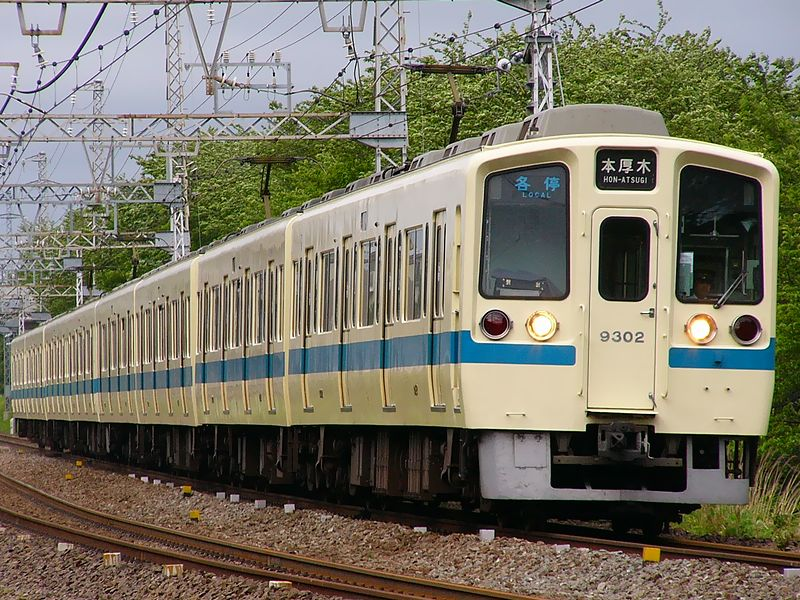 座間市内の小田急小田原線を走行する小田急9000形電車 撮影者・投稿者：Chabata k 撮影日：2004年5月4日 撮影場所：神奈川県座間市 小田急電鉄相武台前駅-座間駅